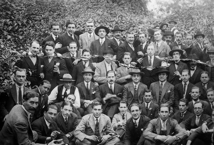 Compañia Minera Vesubio - Chacas 1930